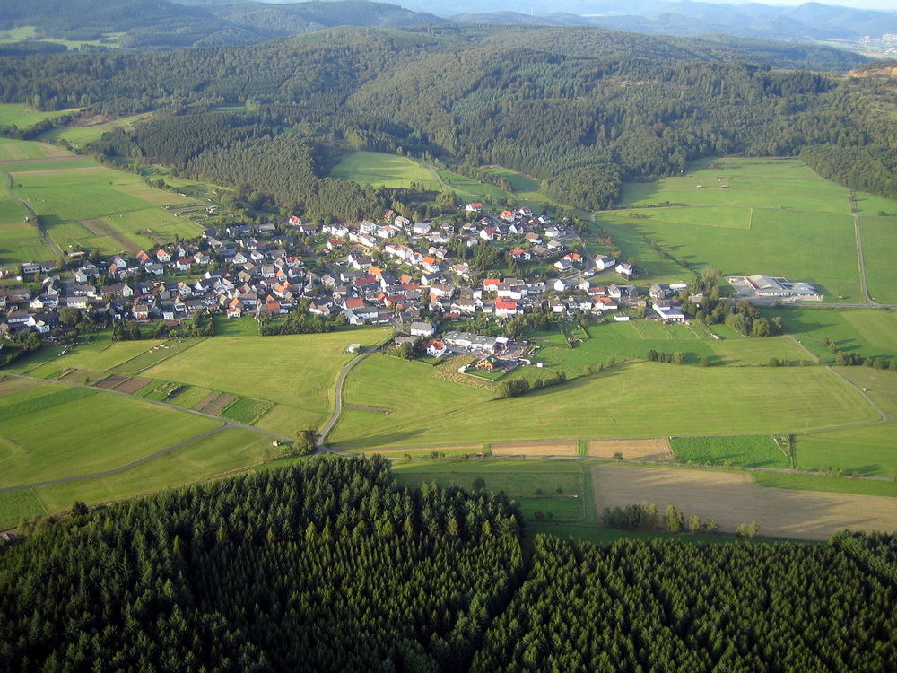 Ort Achenbach